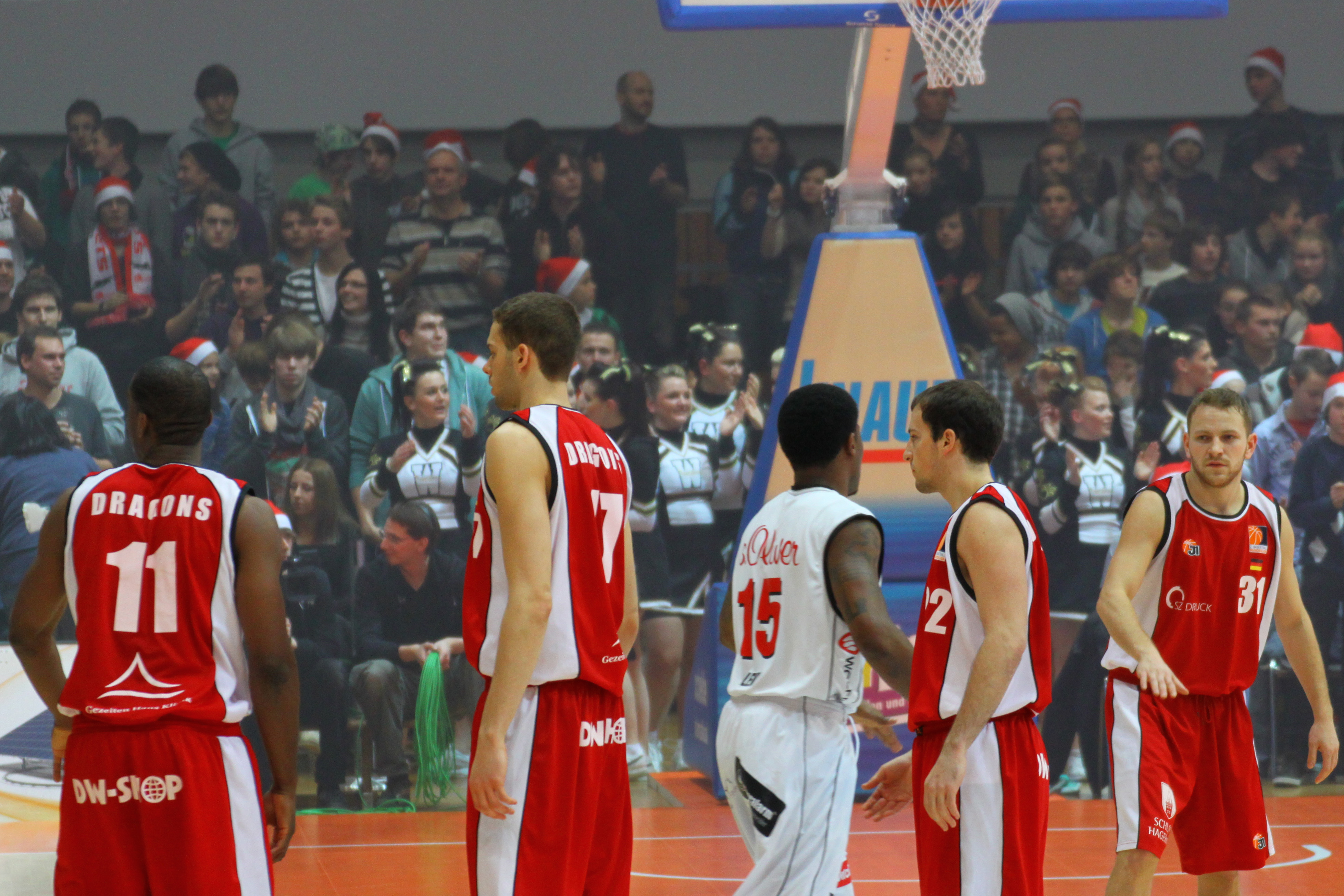 Die Basketballmanschaft Dragons Rhöndorf bei einem Spiel gegen S.Oliver Baskets (Würzburg) am 22. dezember 2010 in der S.Oliver Arena in Würzburg